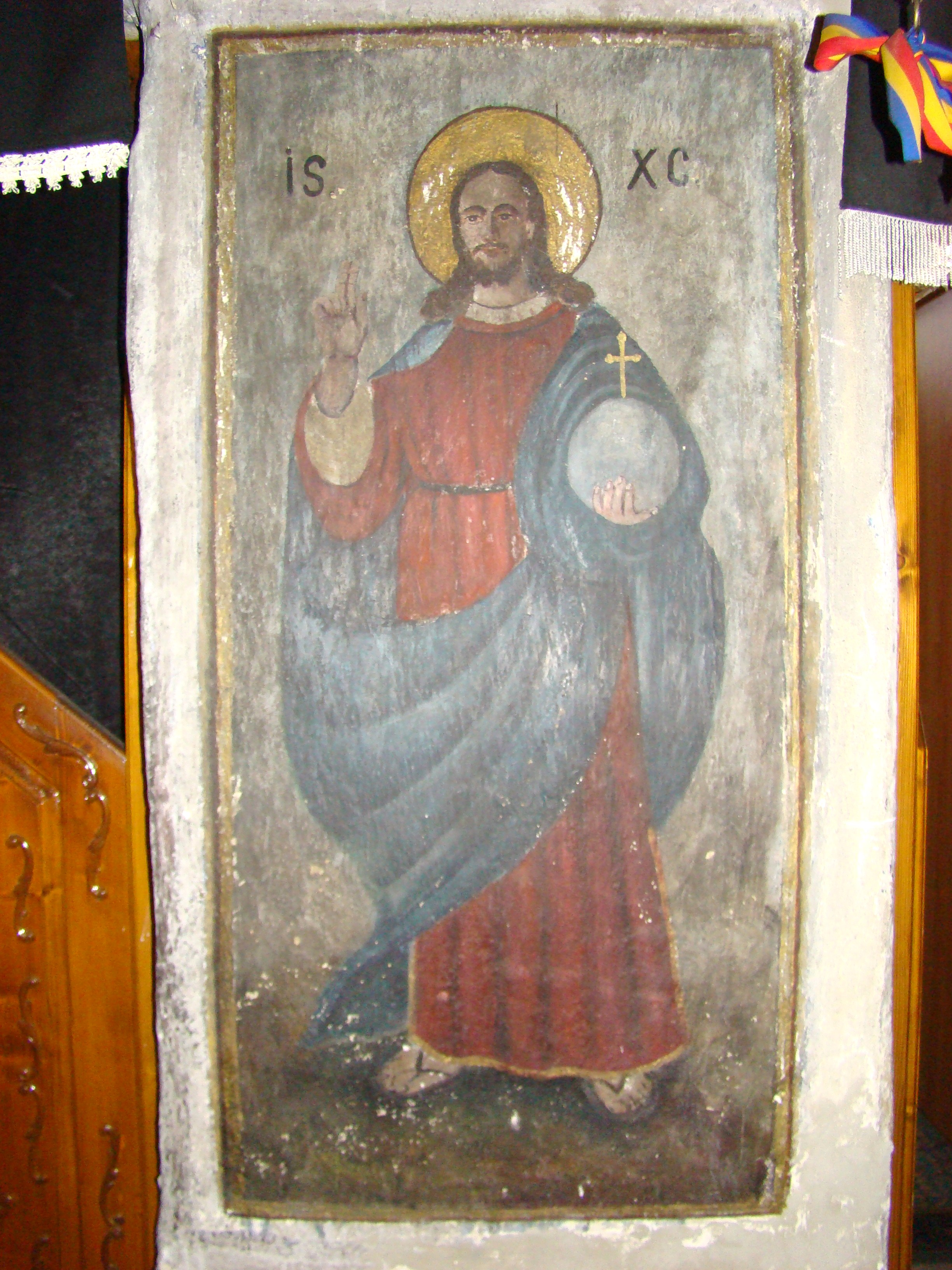 Biserica "Buna Vestire", sat ROŞCANI; comuna DOBRA